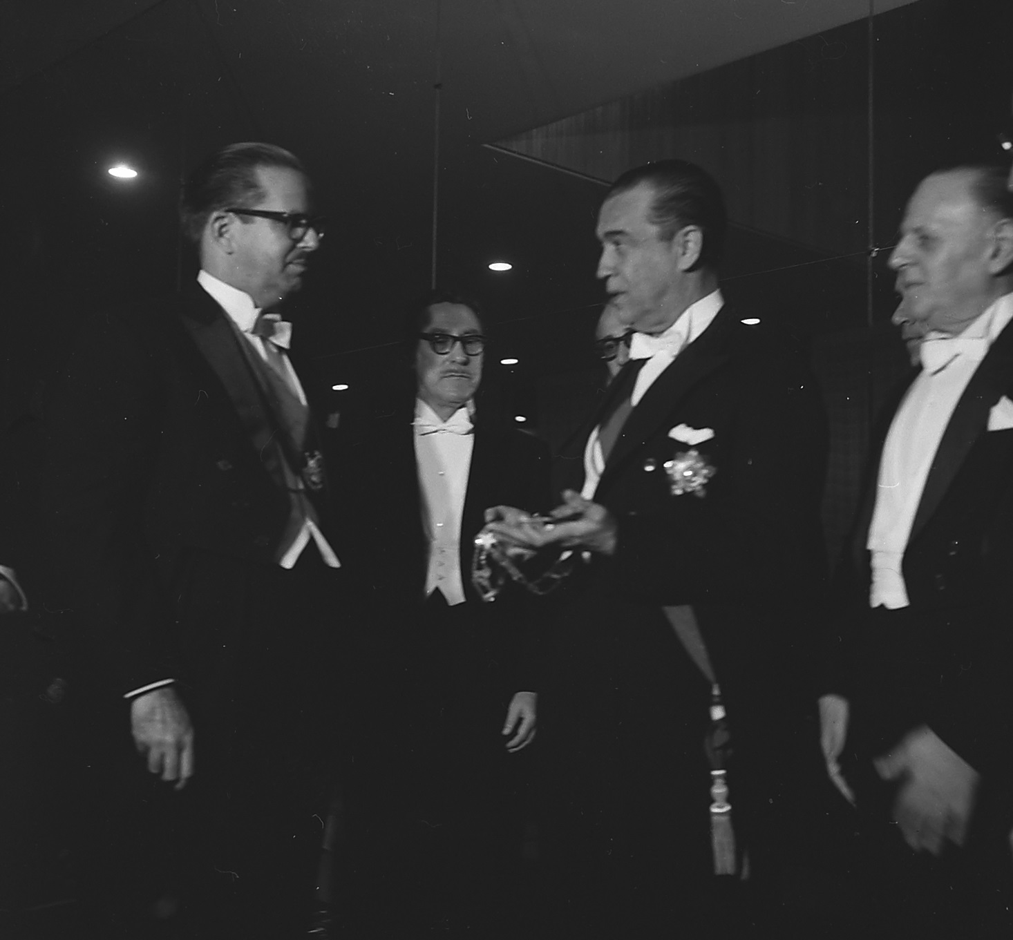 Imagem do Fundo Agência Nacional, do Arquivo Nacional